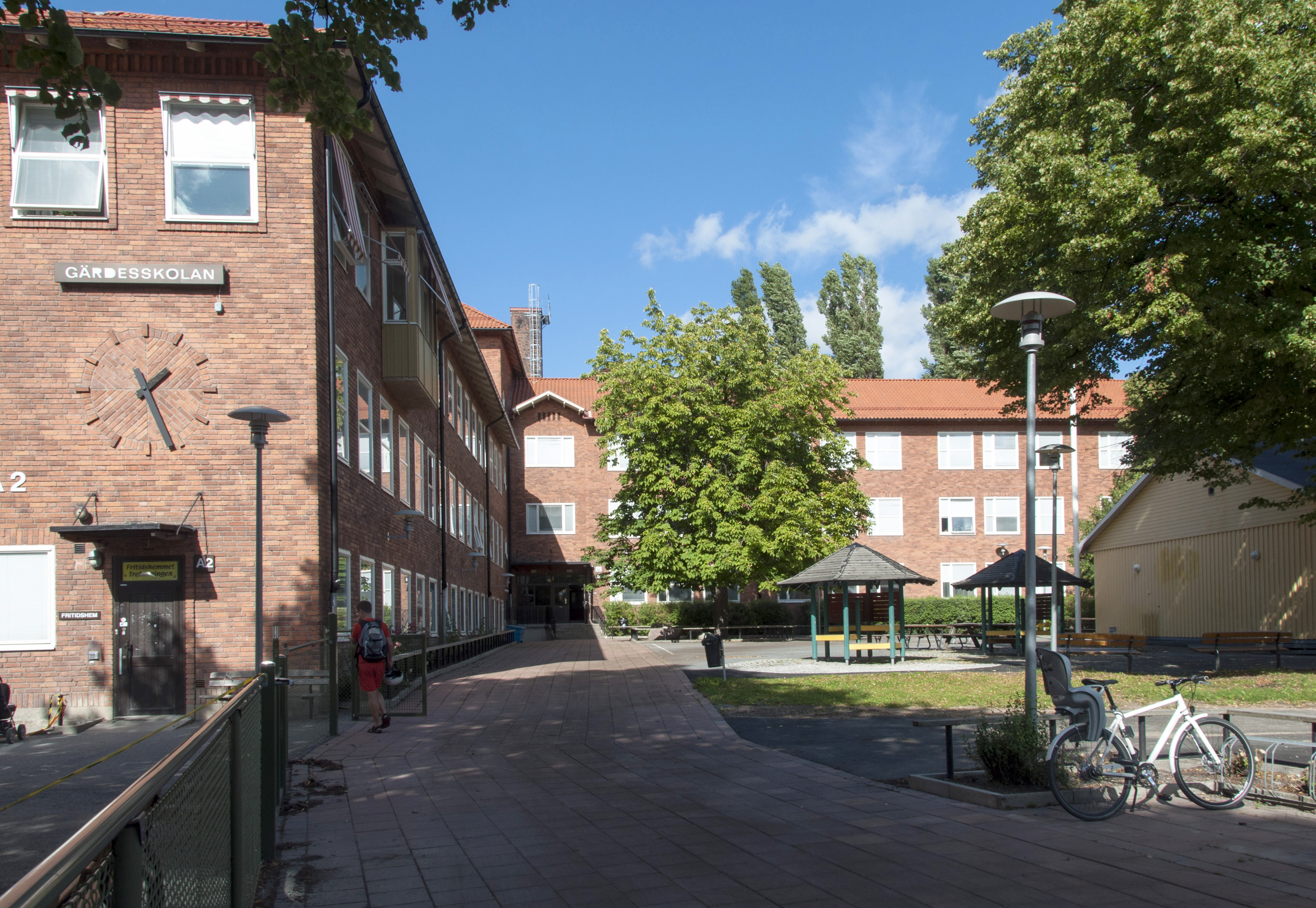 Gärdesskolan, Valhallavägen 175. Byggnadsår 1944-45. Arkitekt Paul Heqdvist.